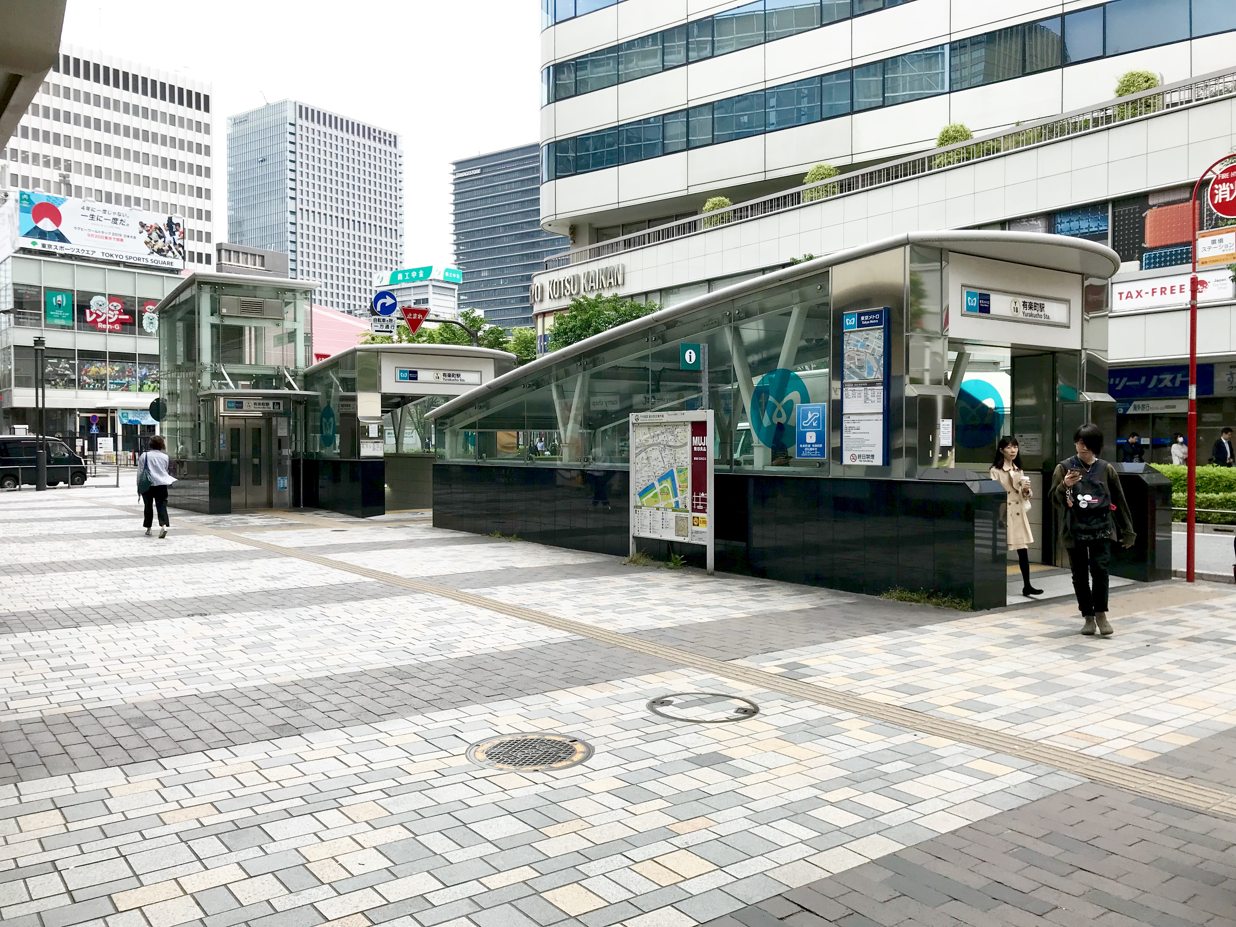 東京メトロ有楽町線有楽町駅D7番出入口